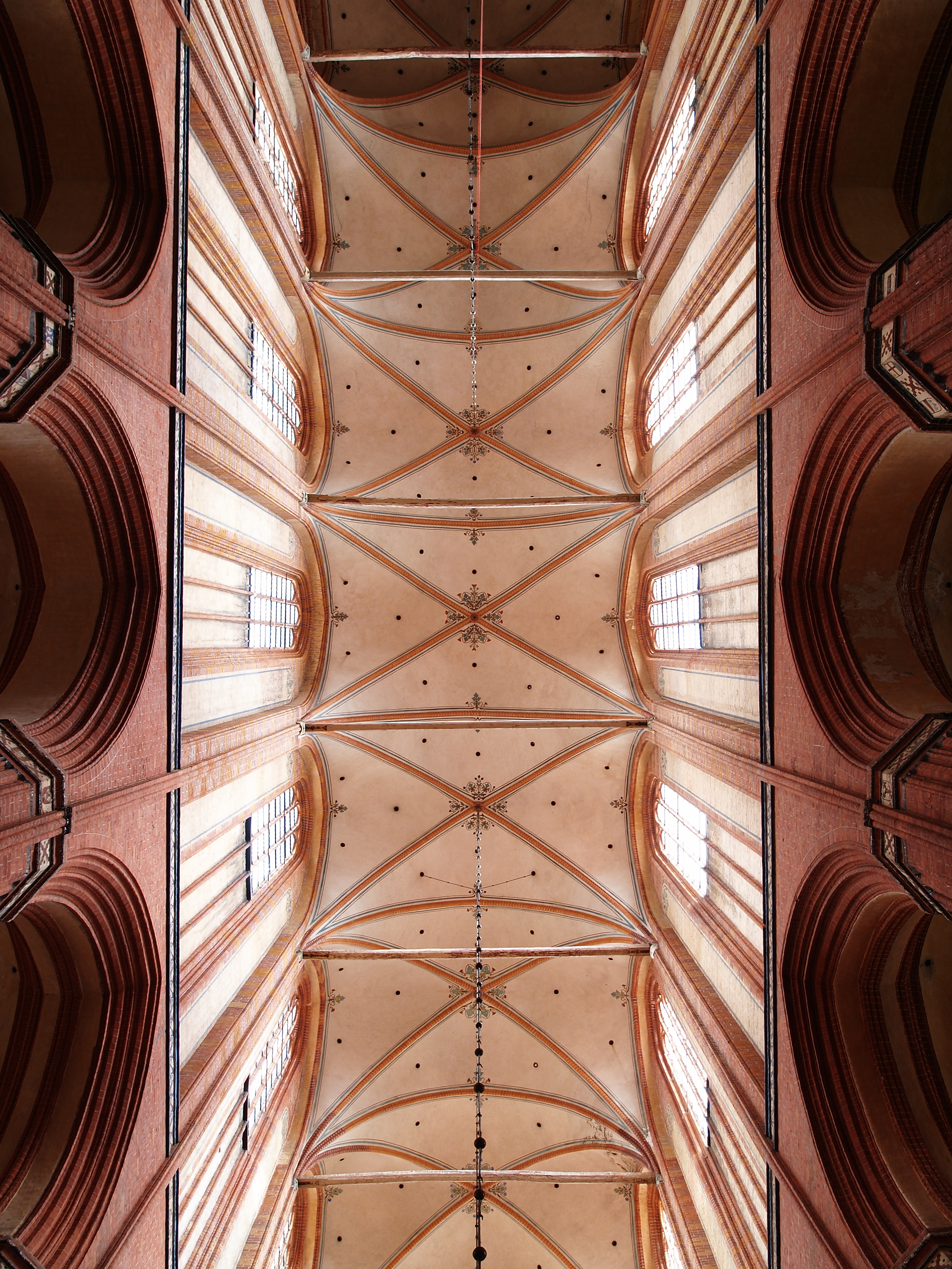 St. Nikolai in Wismar, Gewölbe des Mittelschiffs